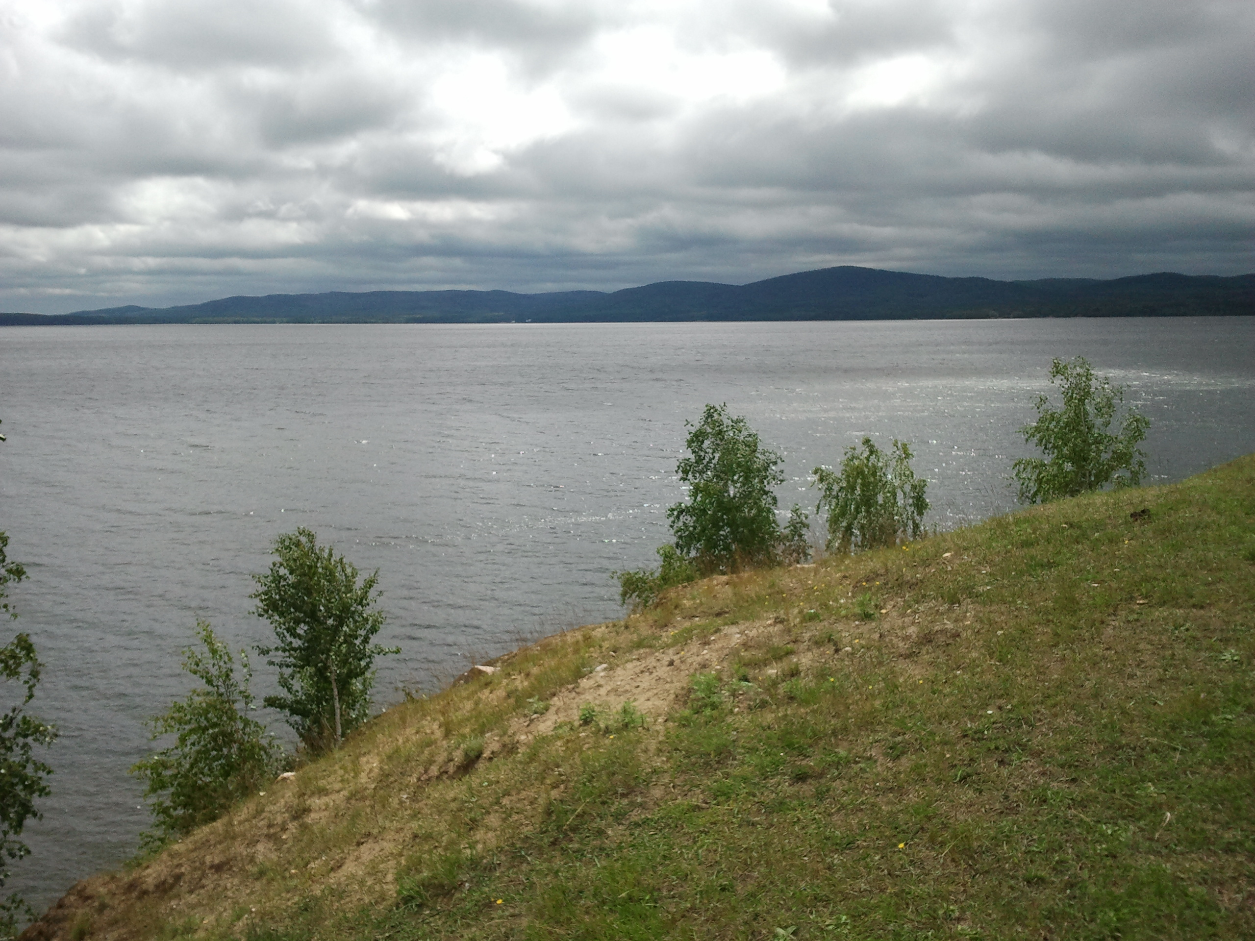 Вид на озеро Иткуль